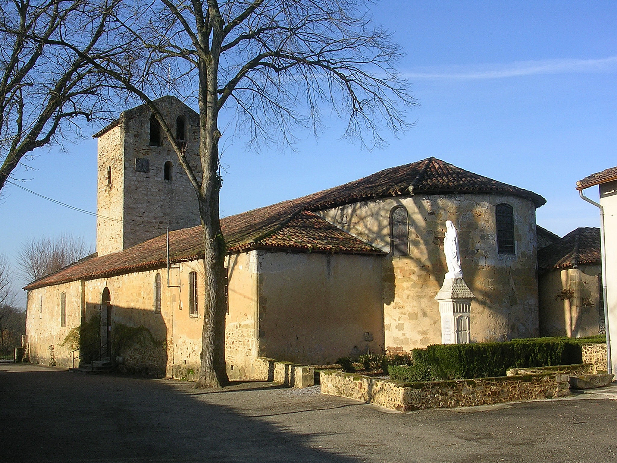 Eglise Saint-Loubouer de Saint-Loubouer (Landes, France)